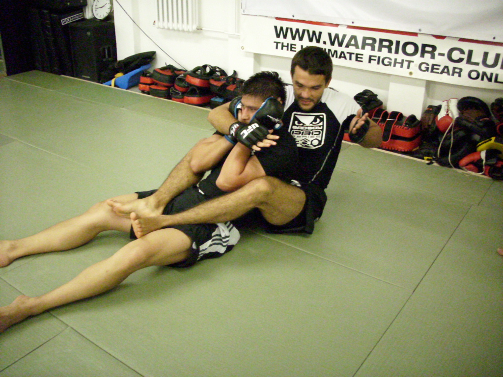 Peter Sobotta (hinten) auf einem Seminar in Hamburg im Juli 2010.